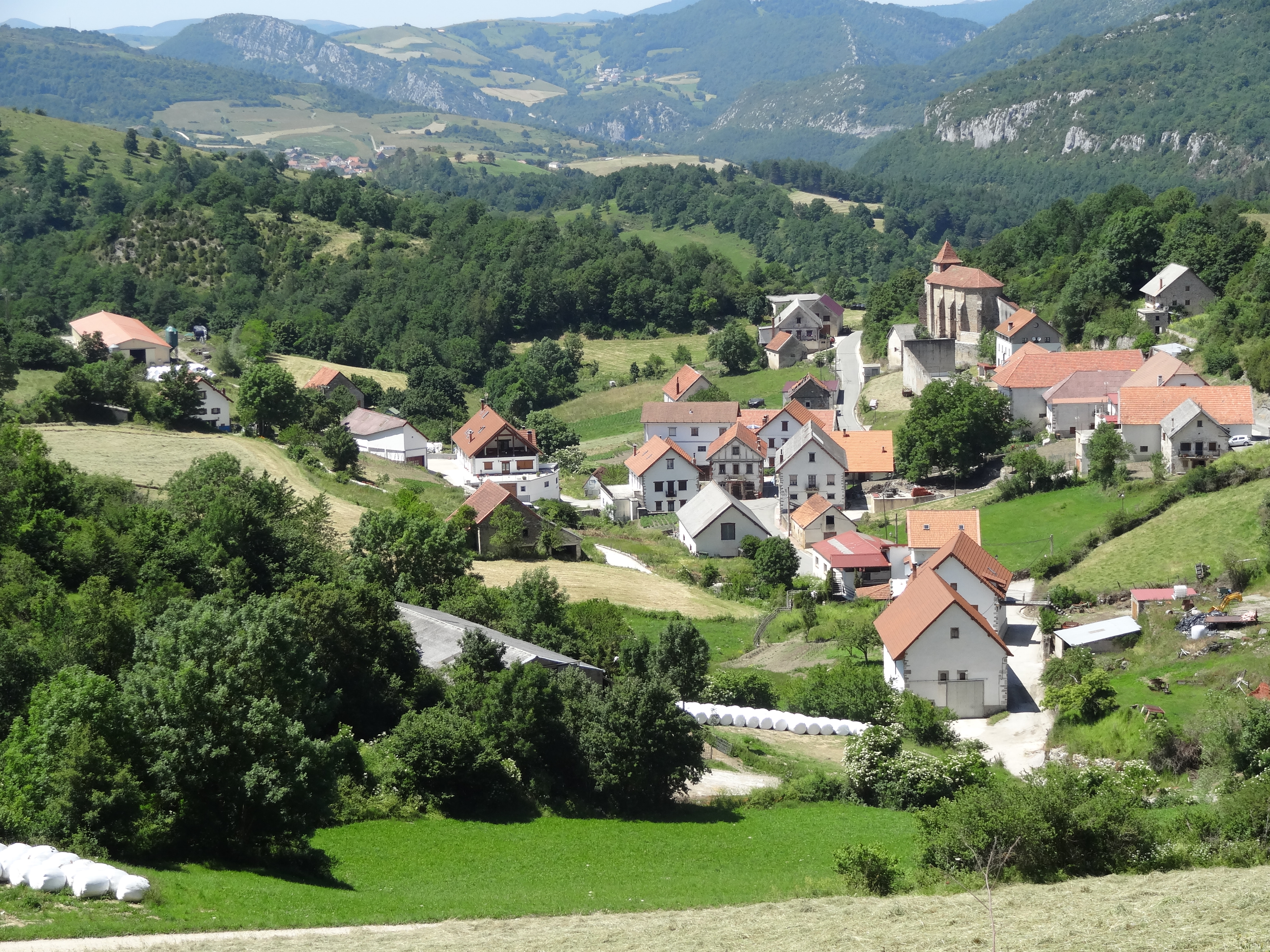 Abaurrepea